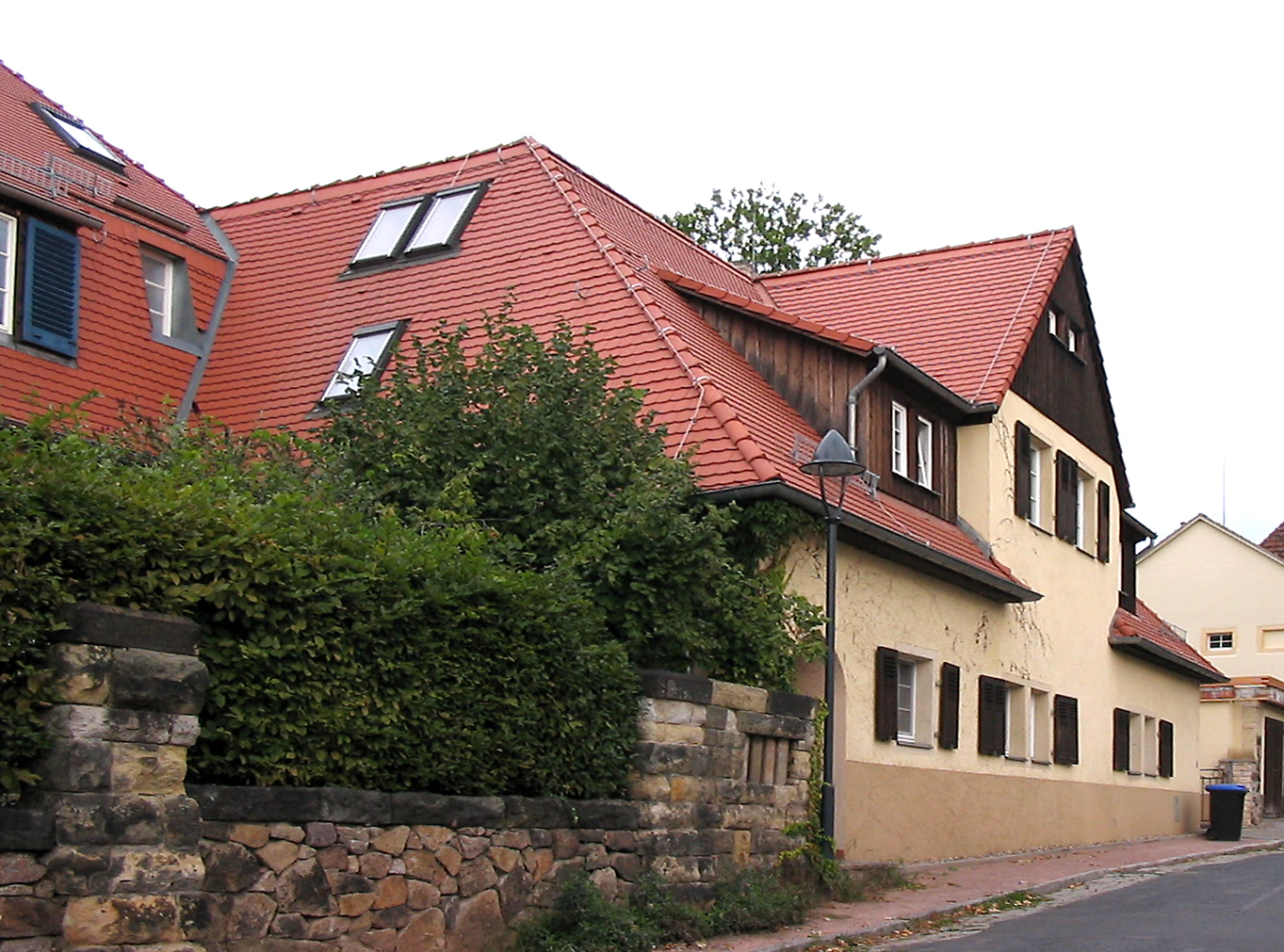 Landhaus für Richard Lange, Oberlößnitz, rechts im Bild das Nebengebäude